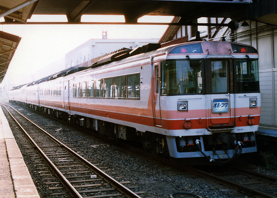 JR北海道 キハ183系特急形気動車 オホーツク 網走駅にて